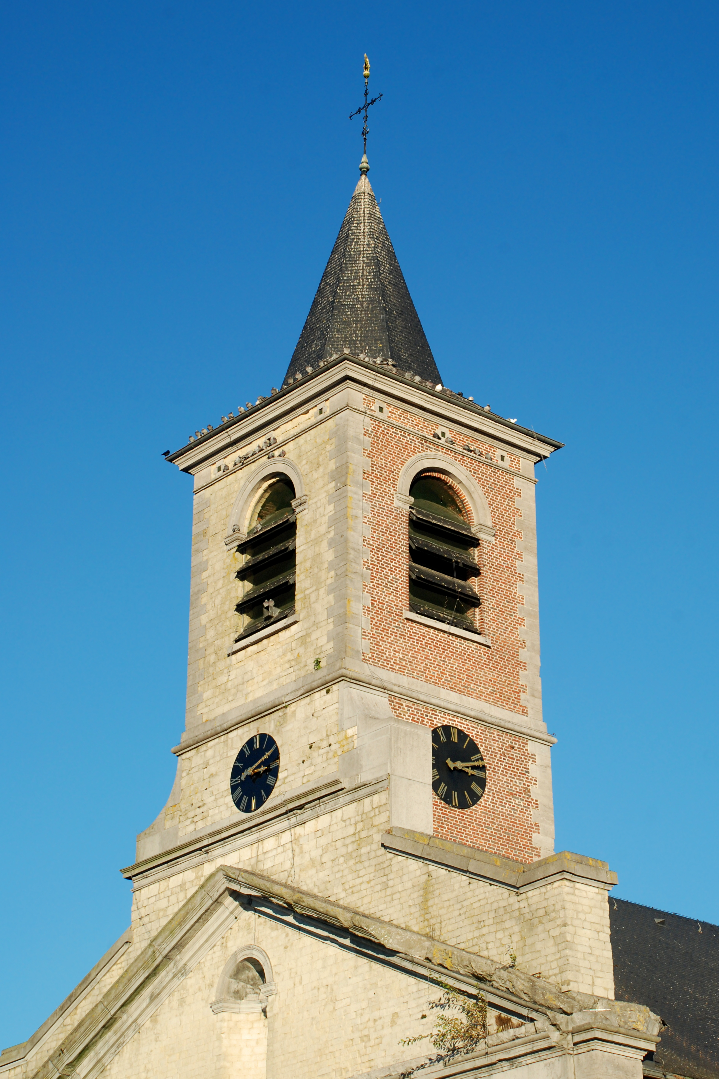 Belgique - Wallonie - Église Saint-Jean l'Évangéliste de Genappe